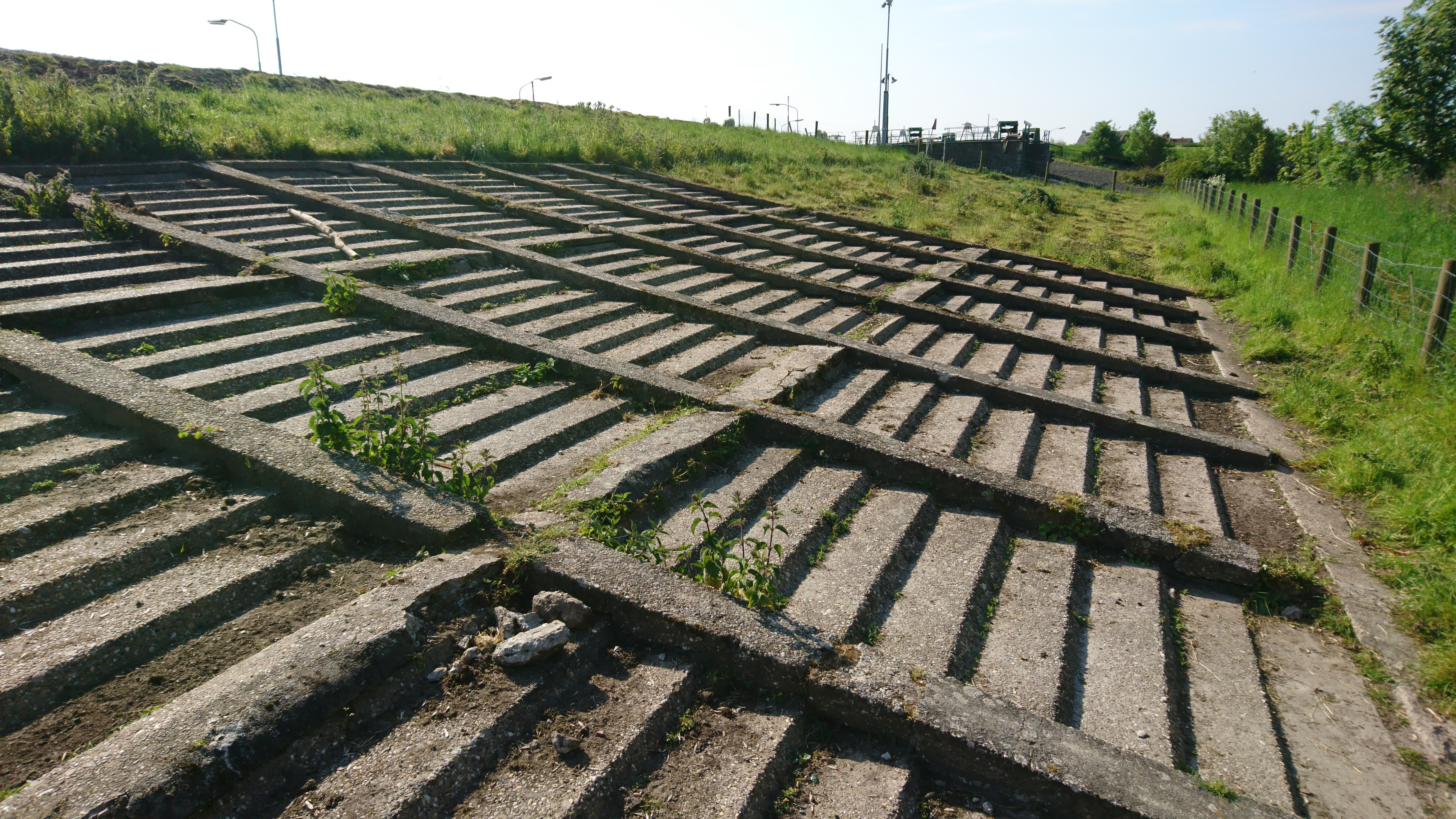 Muraltglooiing nabij Hunsingosluis in Zoutkamp, deels schoongemaakt